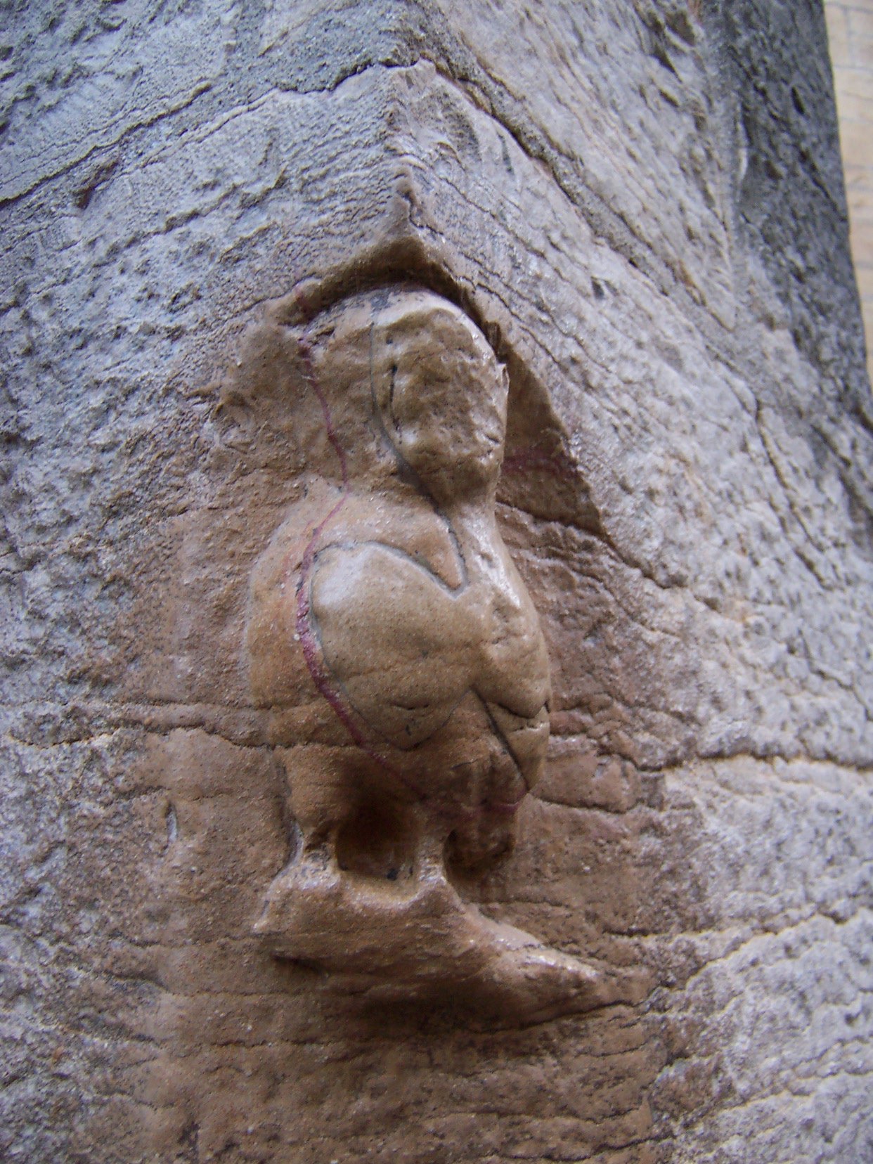 La chouette de Dijon, (Dijon).